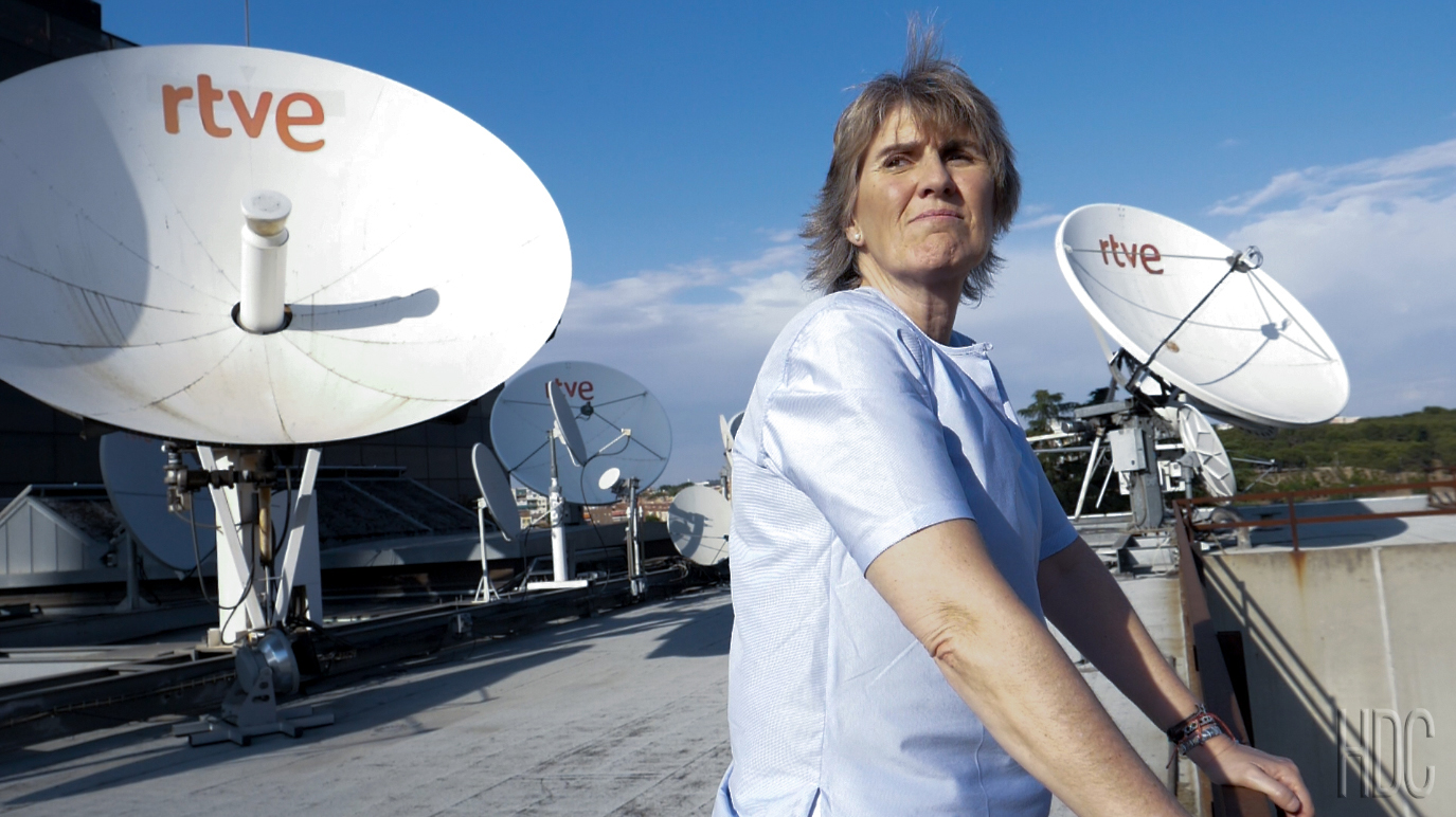 Paloma del Río en un fotograma del documental Hijas de Cynisca (2019) de Beatriz Carretero mientras posa en la azotea de los estudios de RTVE en Torrespaña.